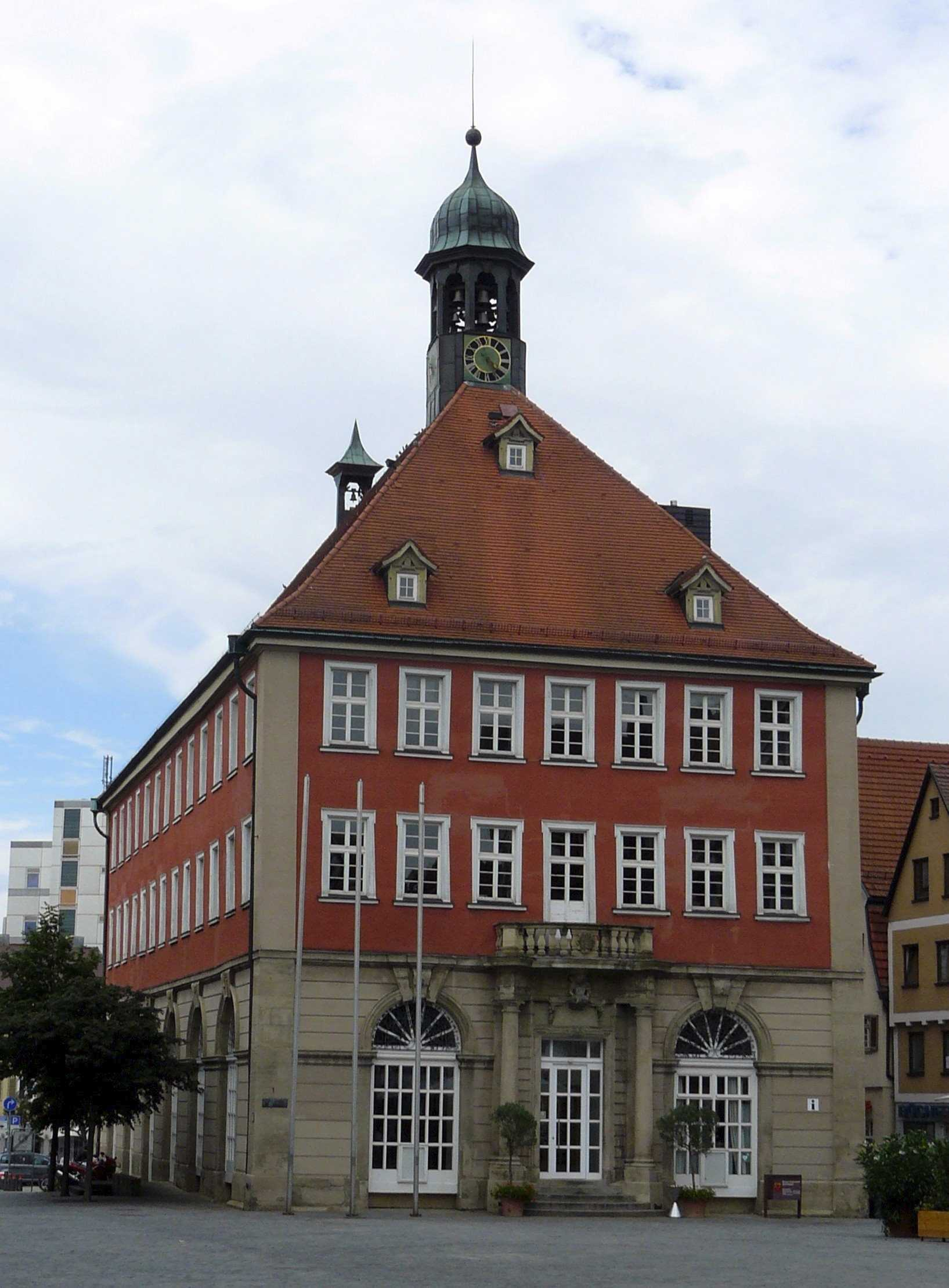 Rathaus in Schorndorf, vom Oberen Marktplatz aus gesehen